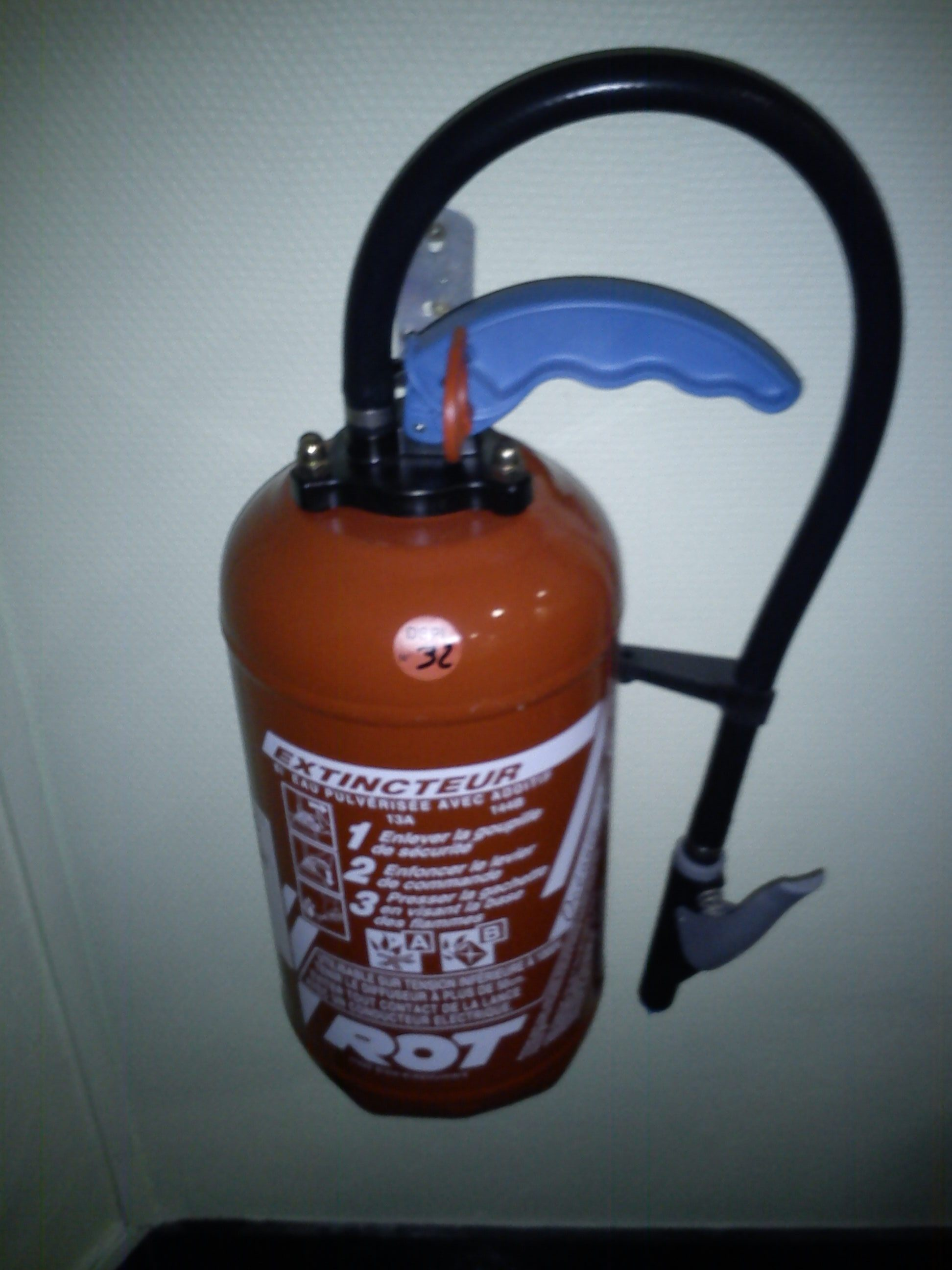 Extincteur d'incendie à eau pulvérisée avec additif